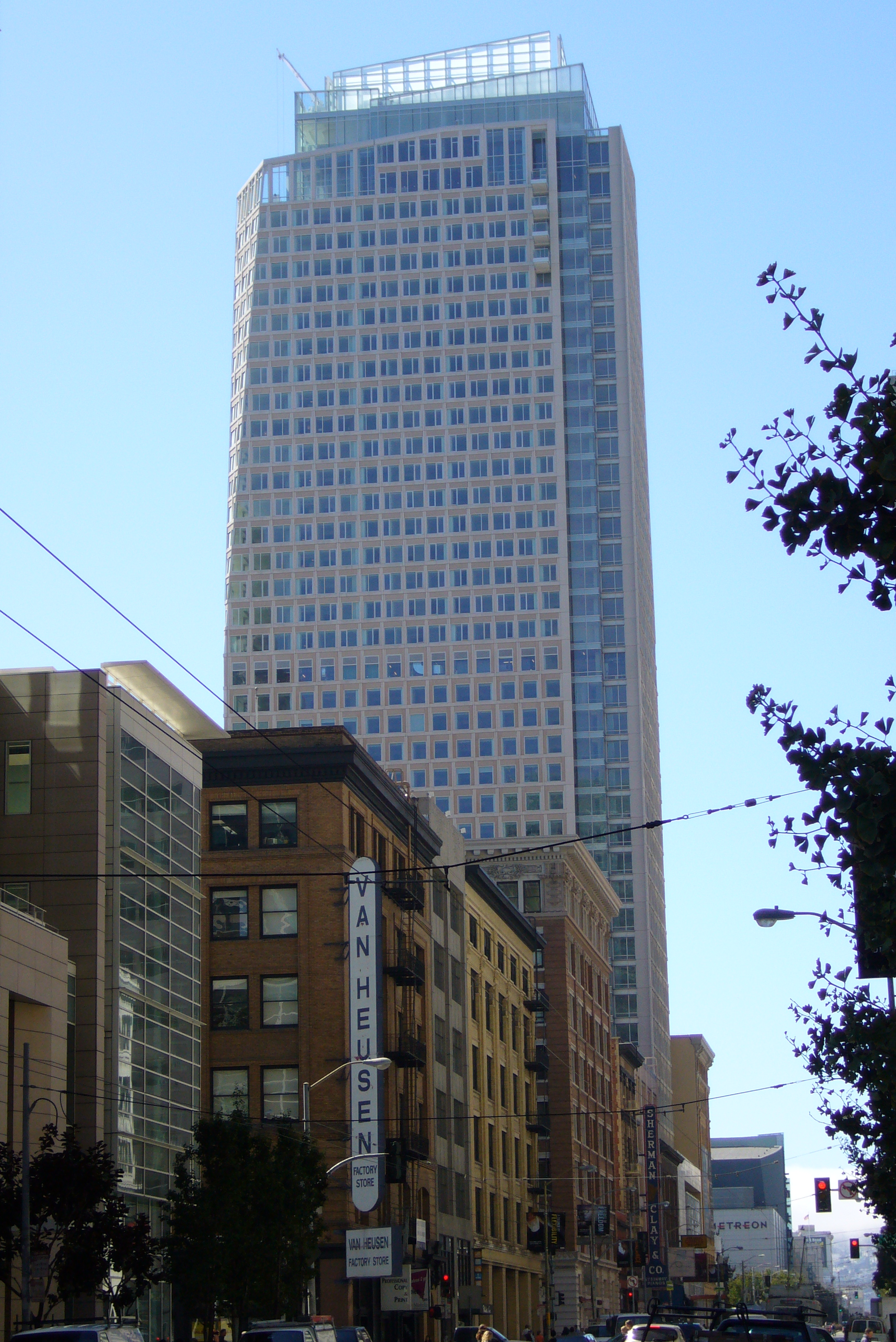 St. Regis Museum Tower, San Francisco